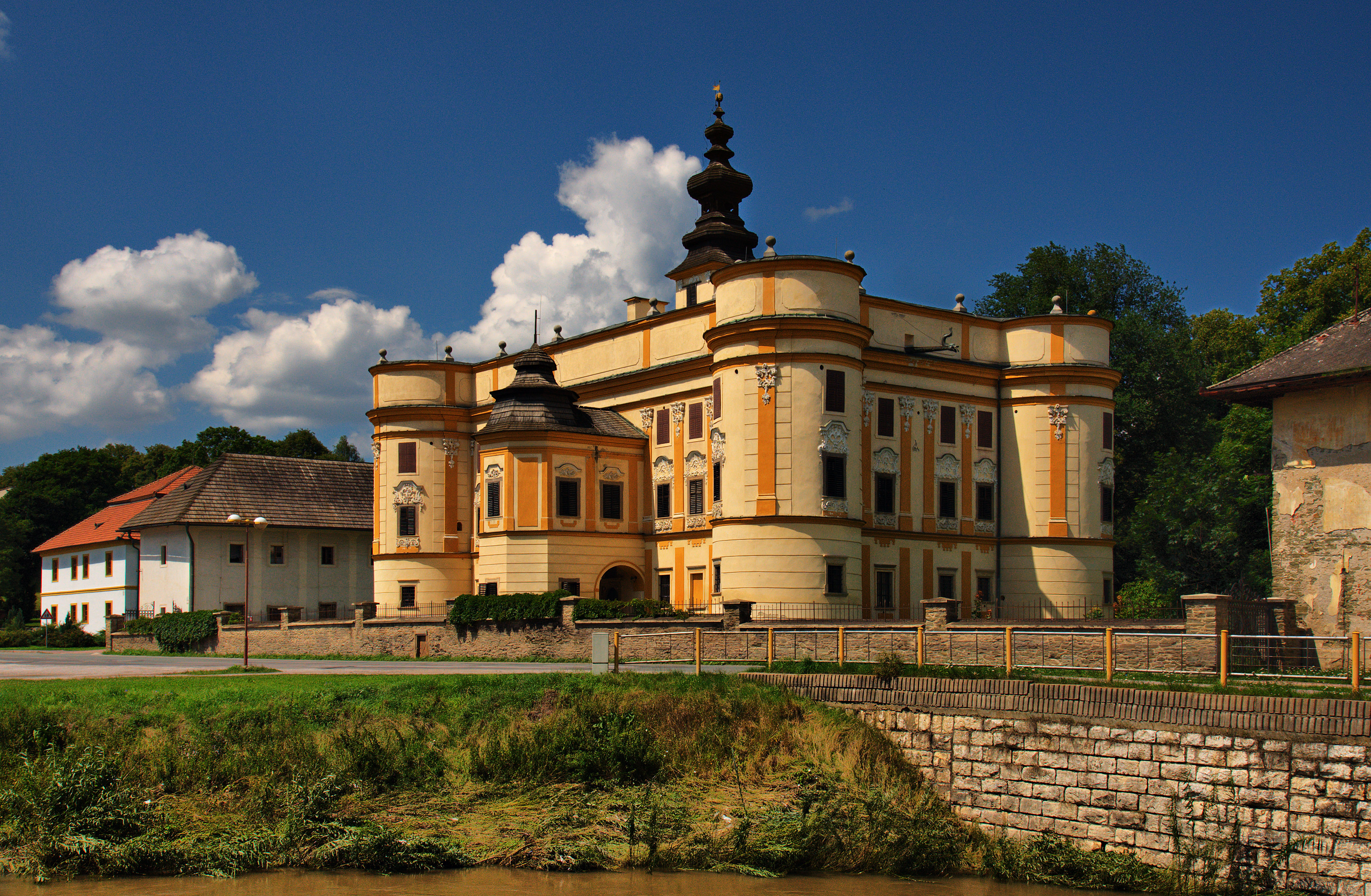 Markušovský kaštieľ